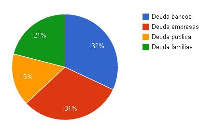 Deuda del estado español, 2012, Plataforma Auditoría Ciudadana de la Deuda (PACD)